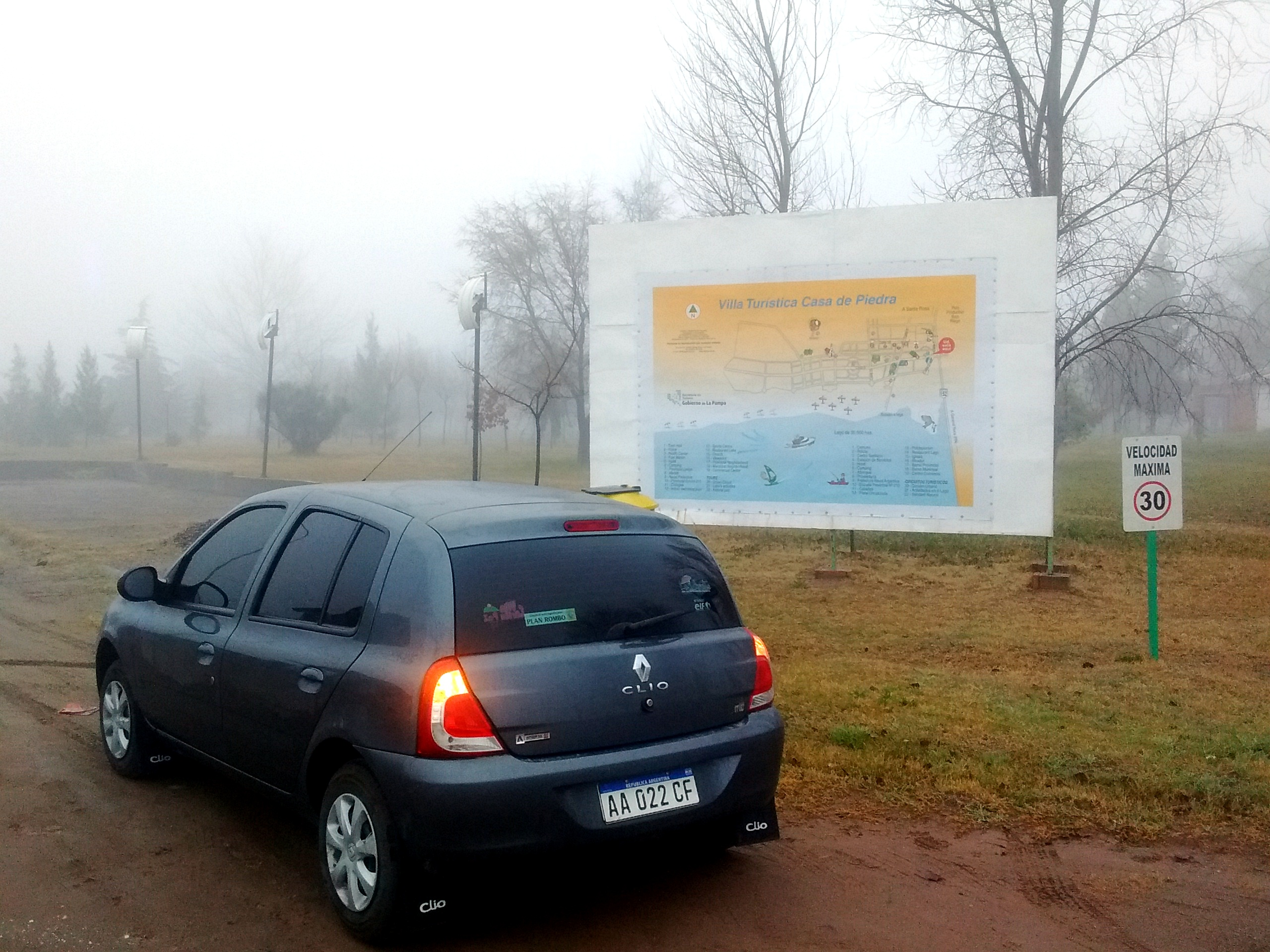 Cartel turístico de los servicios de la localidad